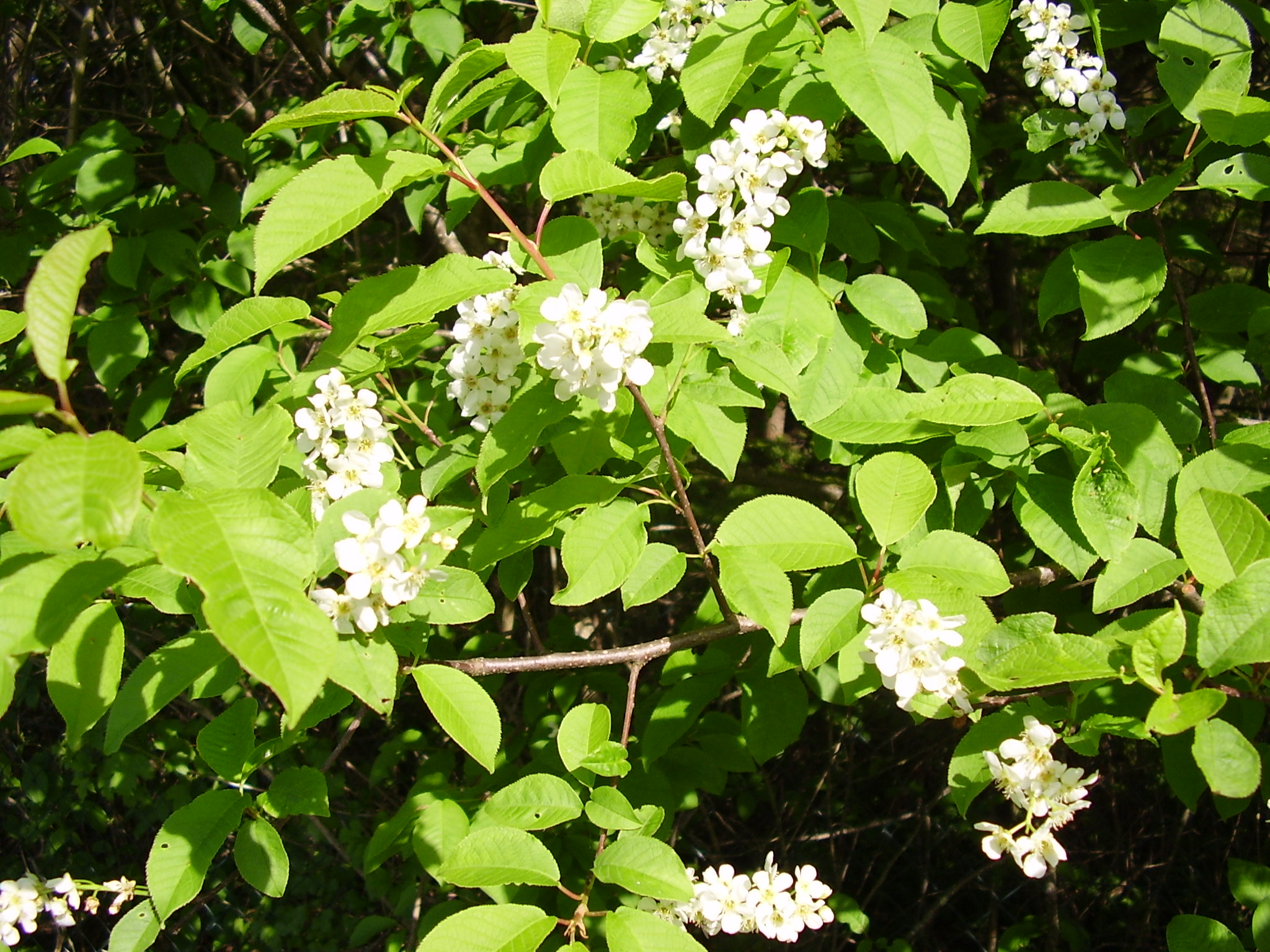 Floraison d'Amélanchier en épi (Amelanchier spicata) dans la vallée du Neuné, à Biffontaine (88).